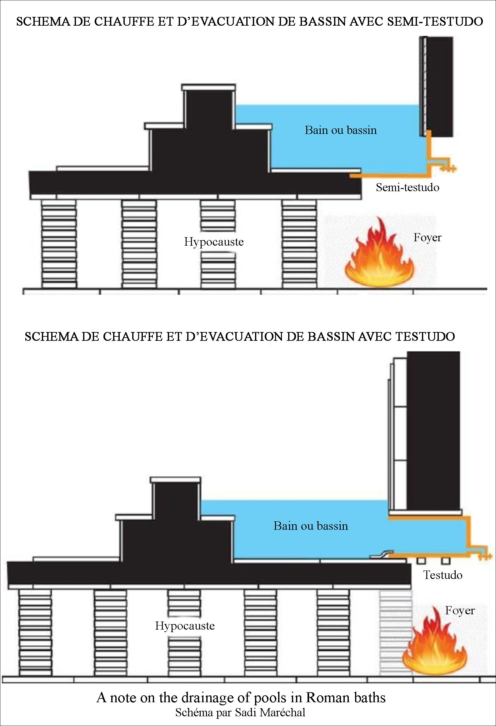 Schéma de production de chaleur pour bassin avec et sans testudo.